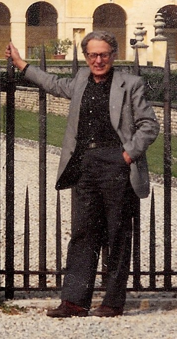 Foto intera